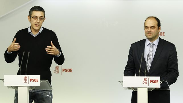 Eduardo Madina et Juan Carlos Díez présentent l'avancée de leurs travaux en vue du congrès fédéral de juin 2017.